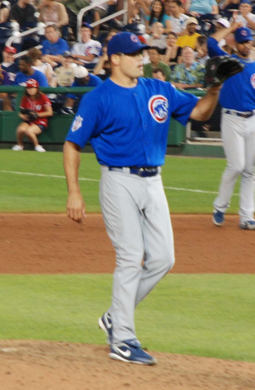 Kevin Gregg